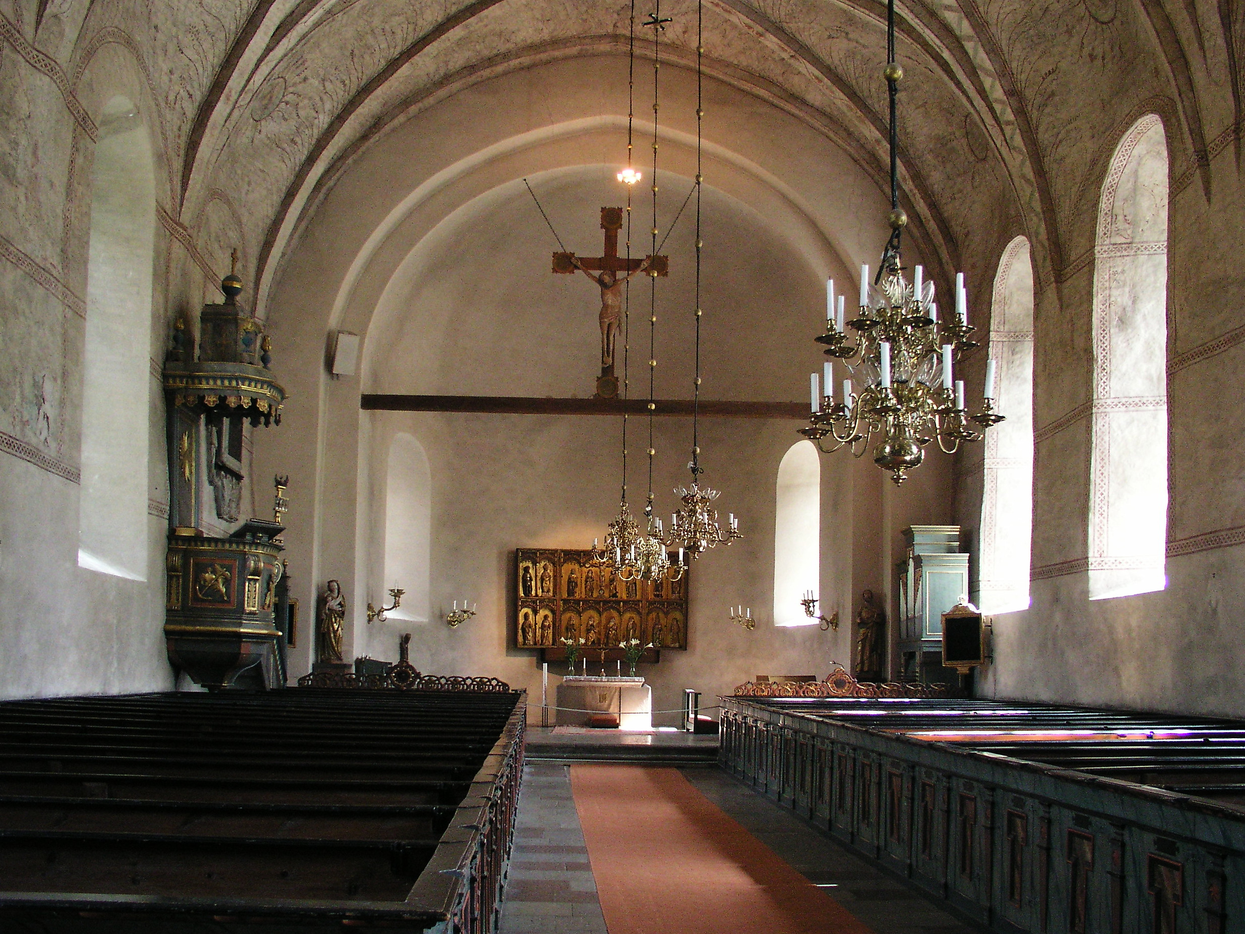 Gamla Uppsala kyrka, Diocese of Uppsala, Gamla Uppsala, Sweden. Nave.